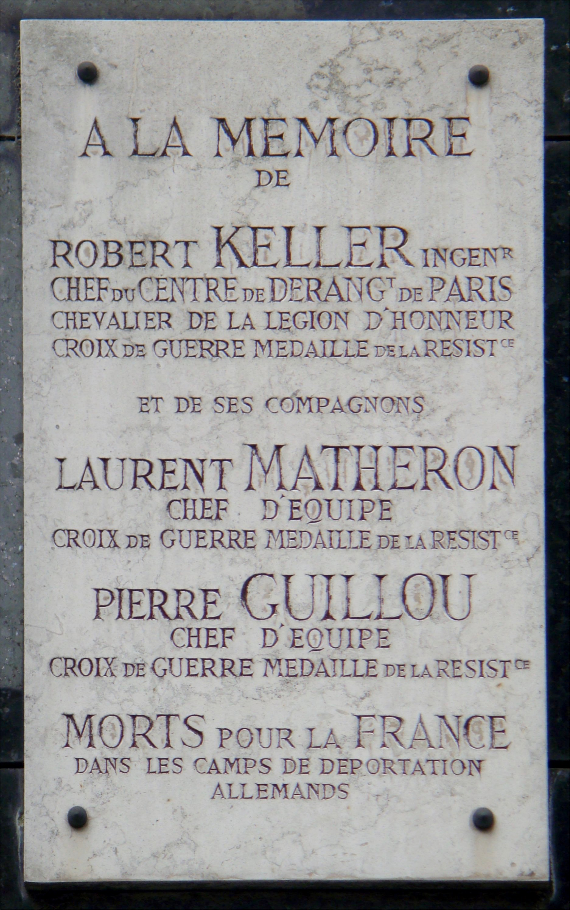 Plaque commémorative apposée depuis 1972 devant l'entrée du centre téléphonique de Paris Robert Keller, sis 6 rue de l'Ingénieur-Robert-Keller, en l'honneur du sacrifice de l'Ingénieur des PTT Robert Keller et de ses compagnons : les chefs d'équipe du service des lignes des PTT Laurent Matheron et Pierre Guillou. Morts pour que vive la France.Inscription : « À la mémoire de Robert Keller, ingénieur, chef du centre de dérangement de Paris, chevalier de la légion d'honneur, croix de guerre médaille de la résistance. Et ses compagnons : Laurent Matheron, chef d'équipe, croix de guerre, médaille de la résistance. Pierre Guillou, chef d'équipe, croix de guerre, médaille de la résistance. Morts pour la France dans les camps de déportation allemands ».